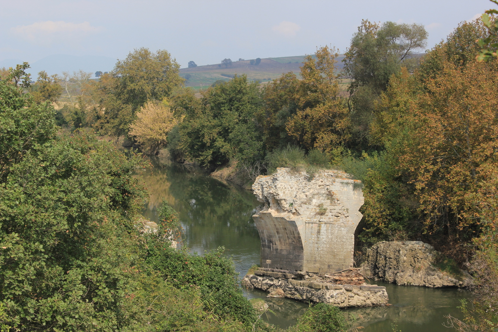 Die Überreste der spätantiken Aiseposbrücke zwischen Biga und Bandırma in der nordwestlichen Türkei.